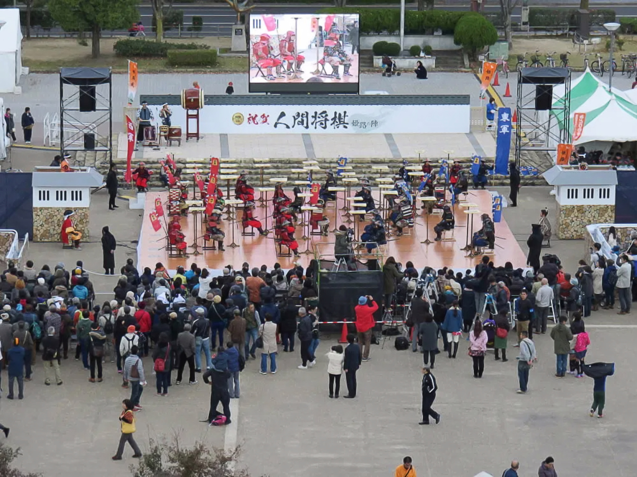 平成27年11月28日、兵庫県姫路市で行われた人間将棋。村田智穂 対 長谷川優貴。